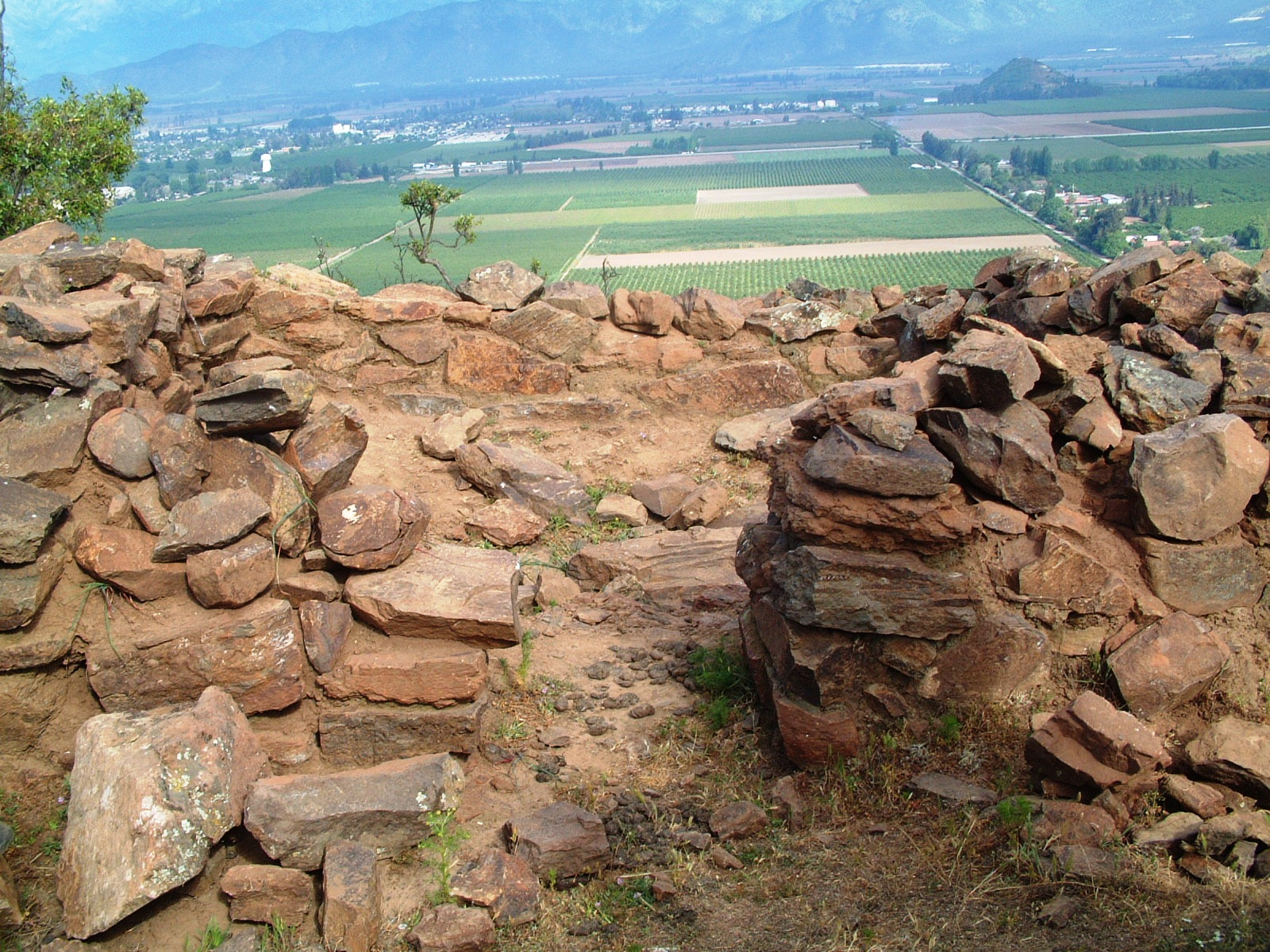 Pukará del cerro La Compañía